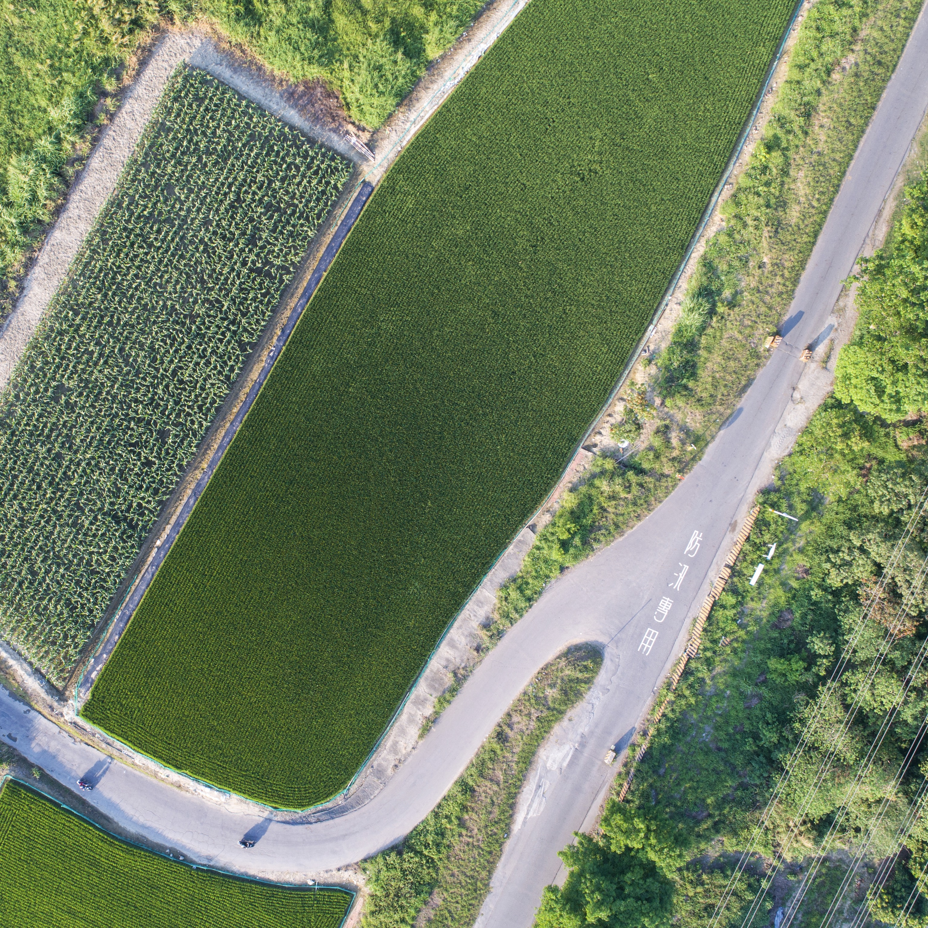 中文（台灣）: 新市區和平路便橋附近3